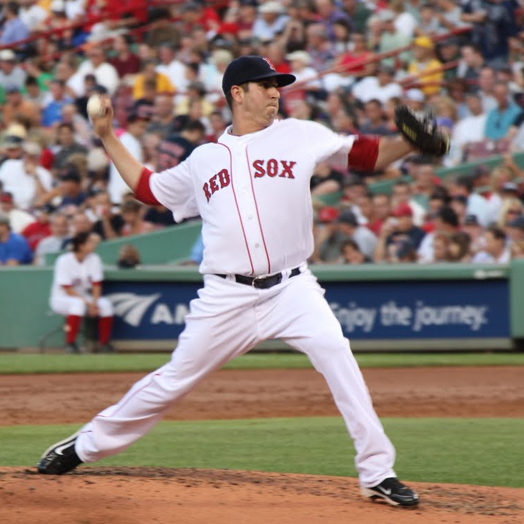 Robert Manuel